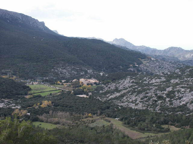 Lluc, Escorca, Mallorca.